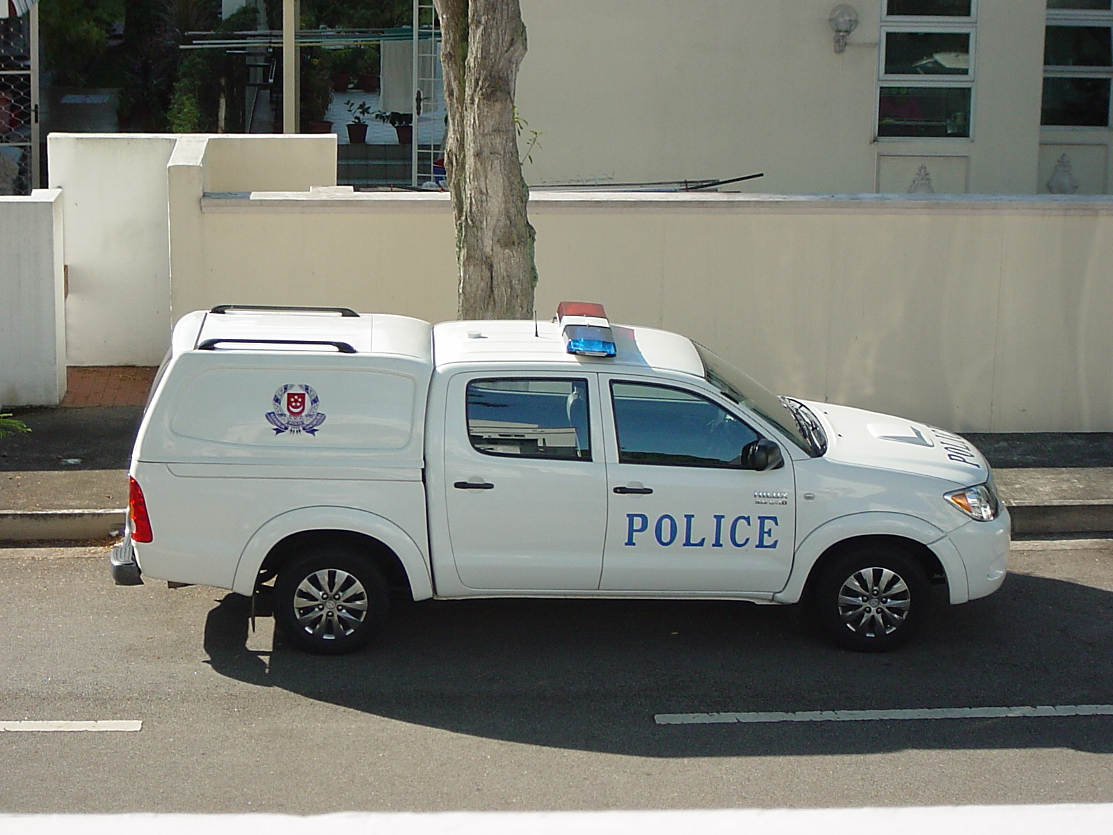 Hilux van